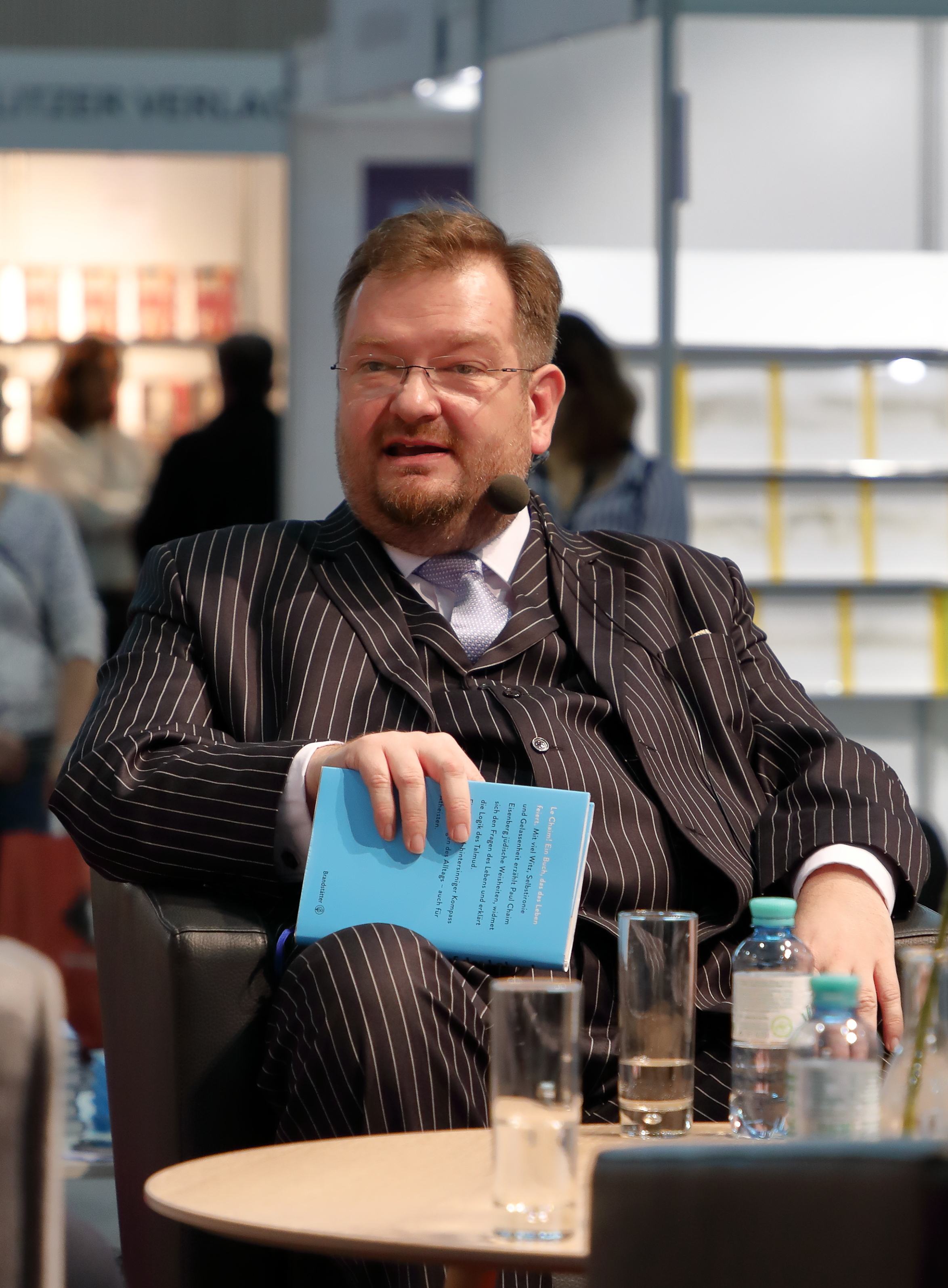 Der Autor und Journalist Martin Haidinger als Moderator auf der ORF-Bühne der Wiener Buchmesse 2017.